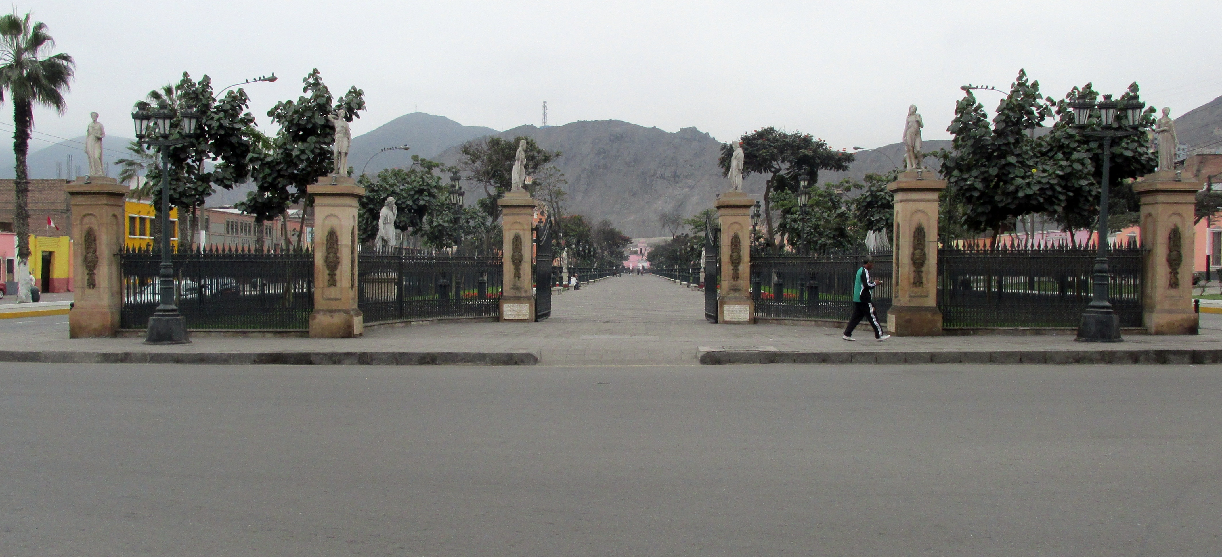 Alameda de los Descalzos